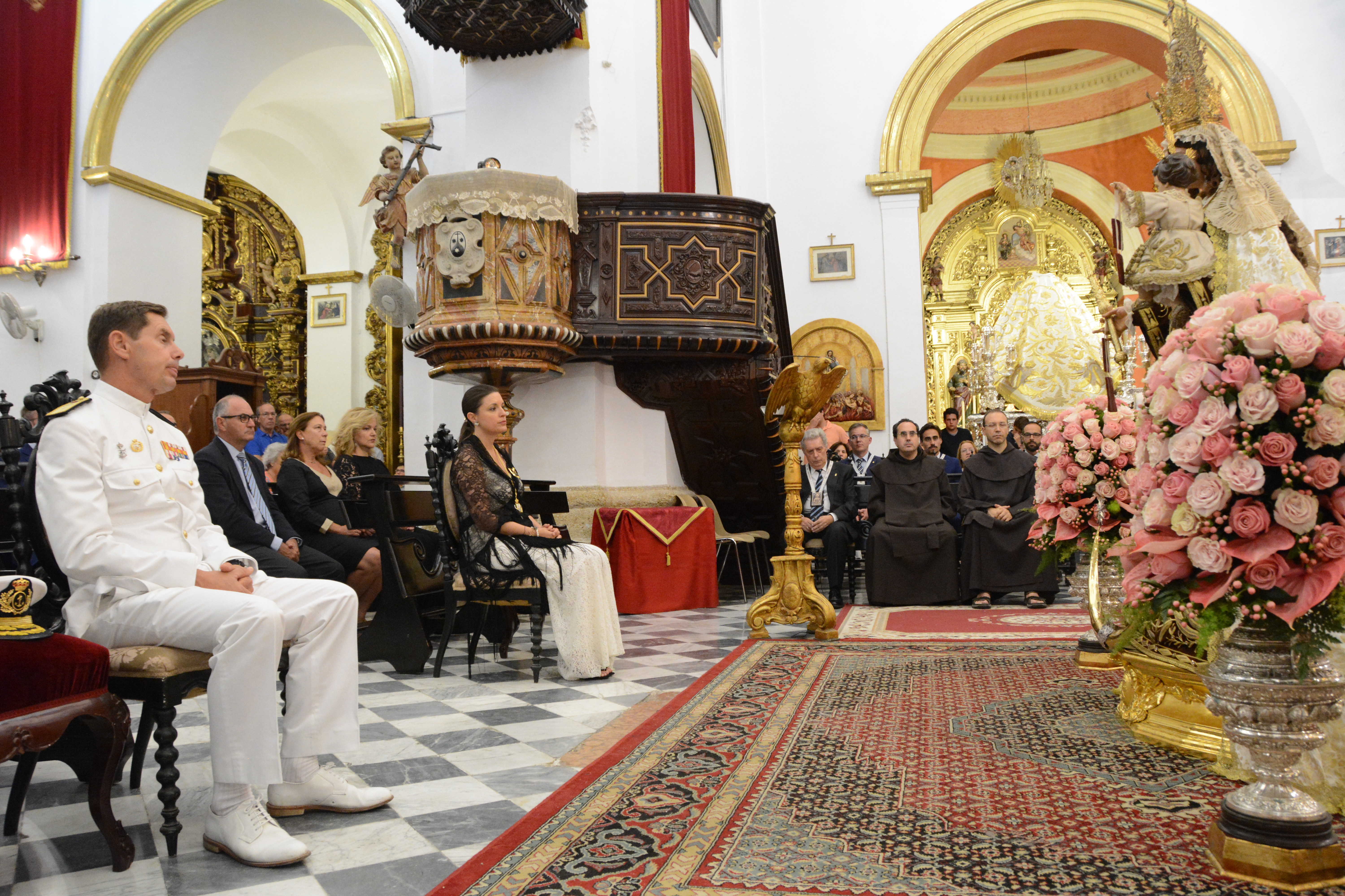 angelus